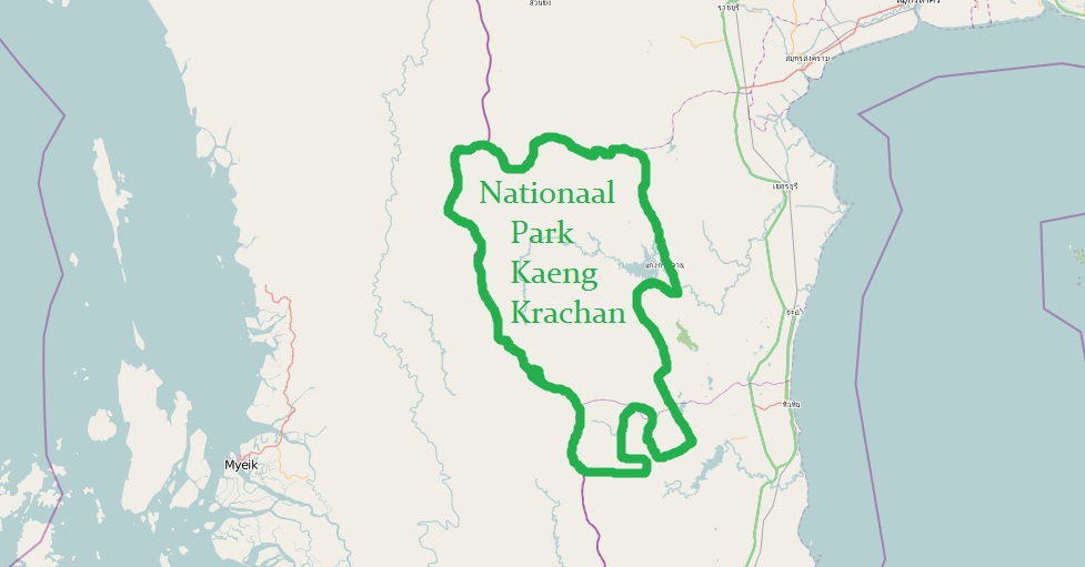 Kaart van Openstreetmap en grenzen van ANWB wegenkaart Thailand, ISBN 978 90 18 03499 3